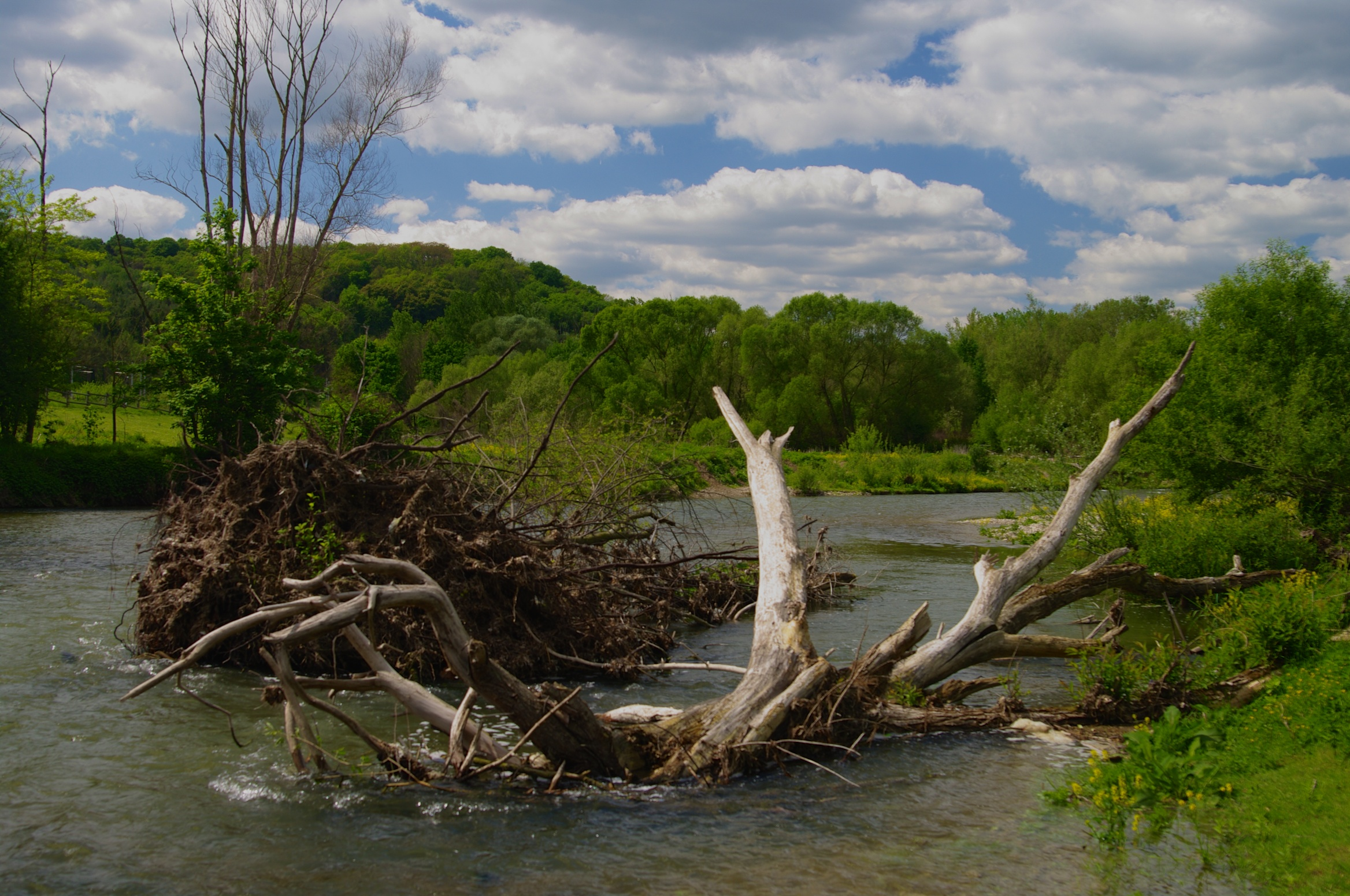 Pielach-Ofenloch-Neubacher Au This media shows the nature reserve in Lower Austria with the ID 51.